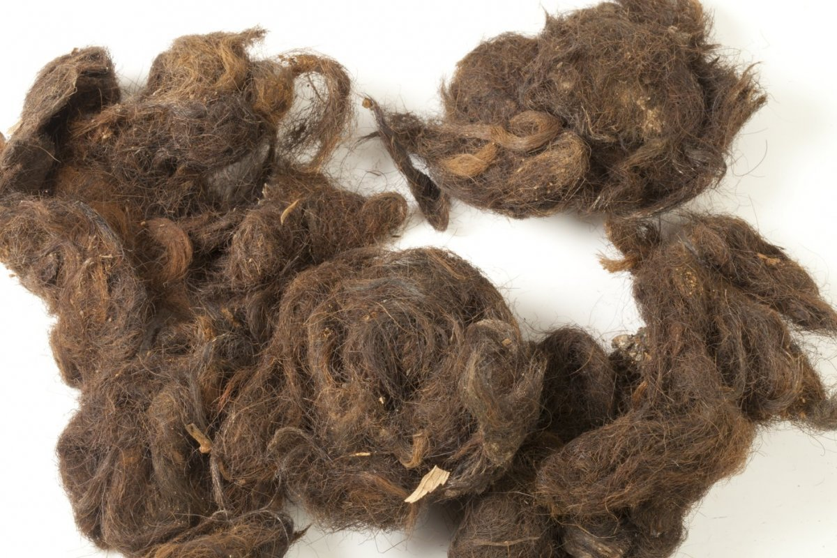 monster breeuwsel van koehaar Objectnummer: [MA]ZWa1959-IX21 Materiaal: haar